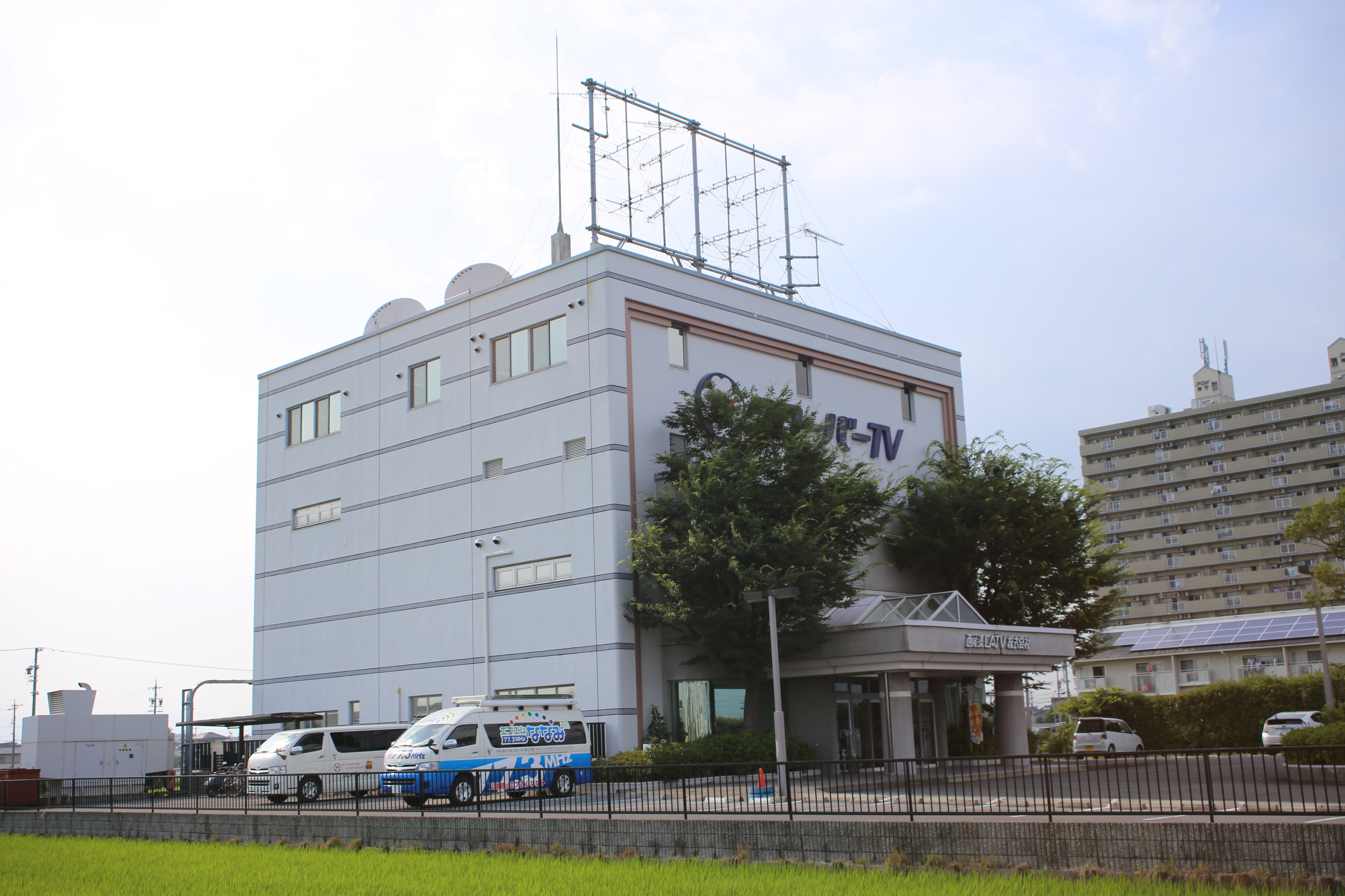 愛知県津島市百島町字観音坊の西尾張CATV（クローバーTV）本社を東側公道南側より撮影